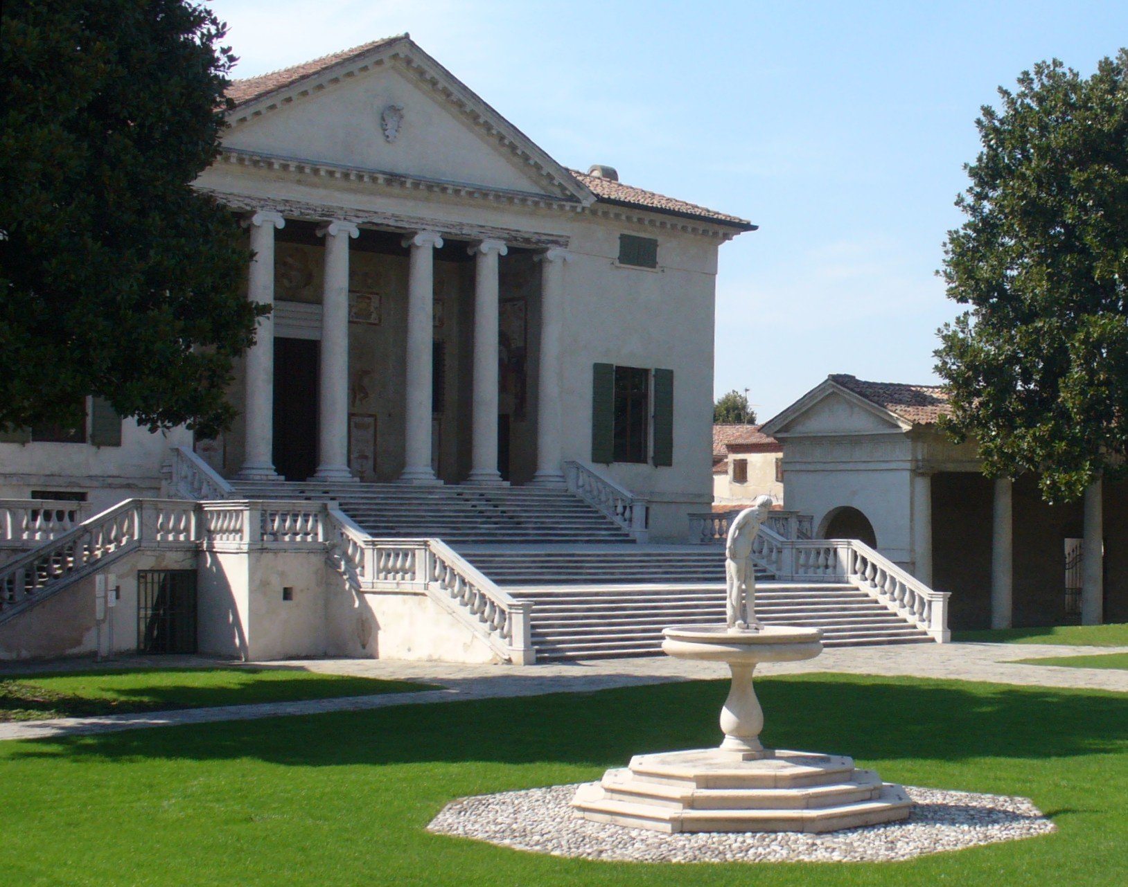 Villa Badoer by Andrea Palladio, Fratta Polesine.